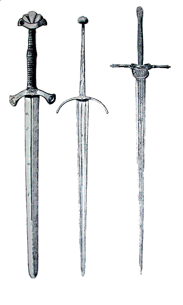 Swords - Late middle age